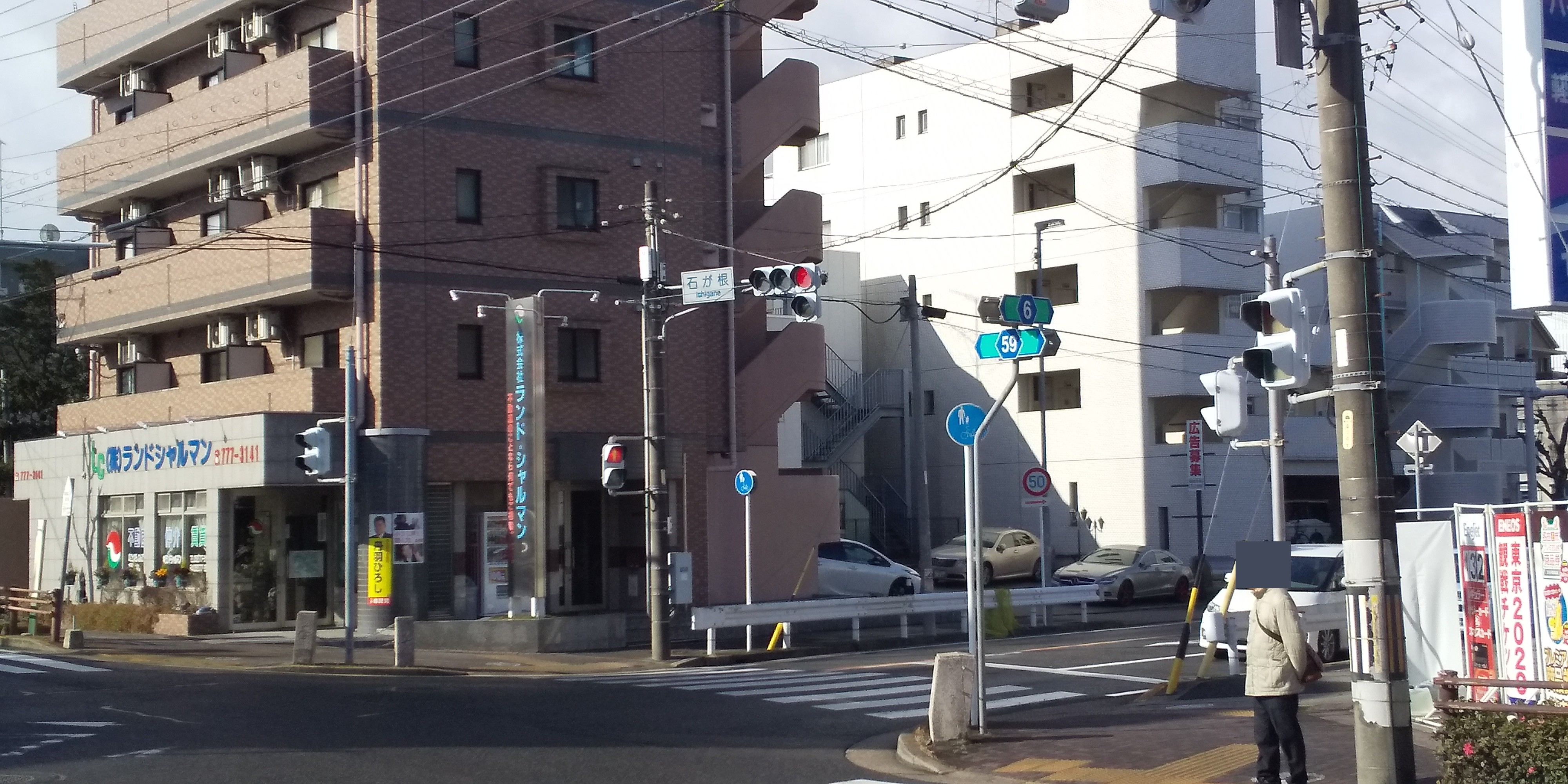 愛知県道6号と愛知県道59号が交差する石が根交差点